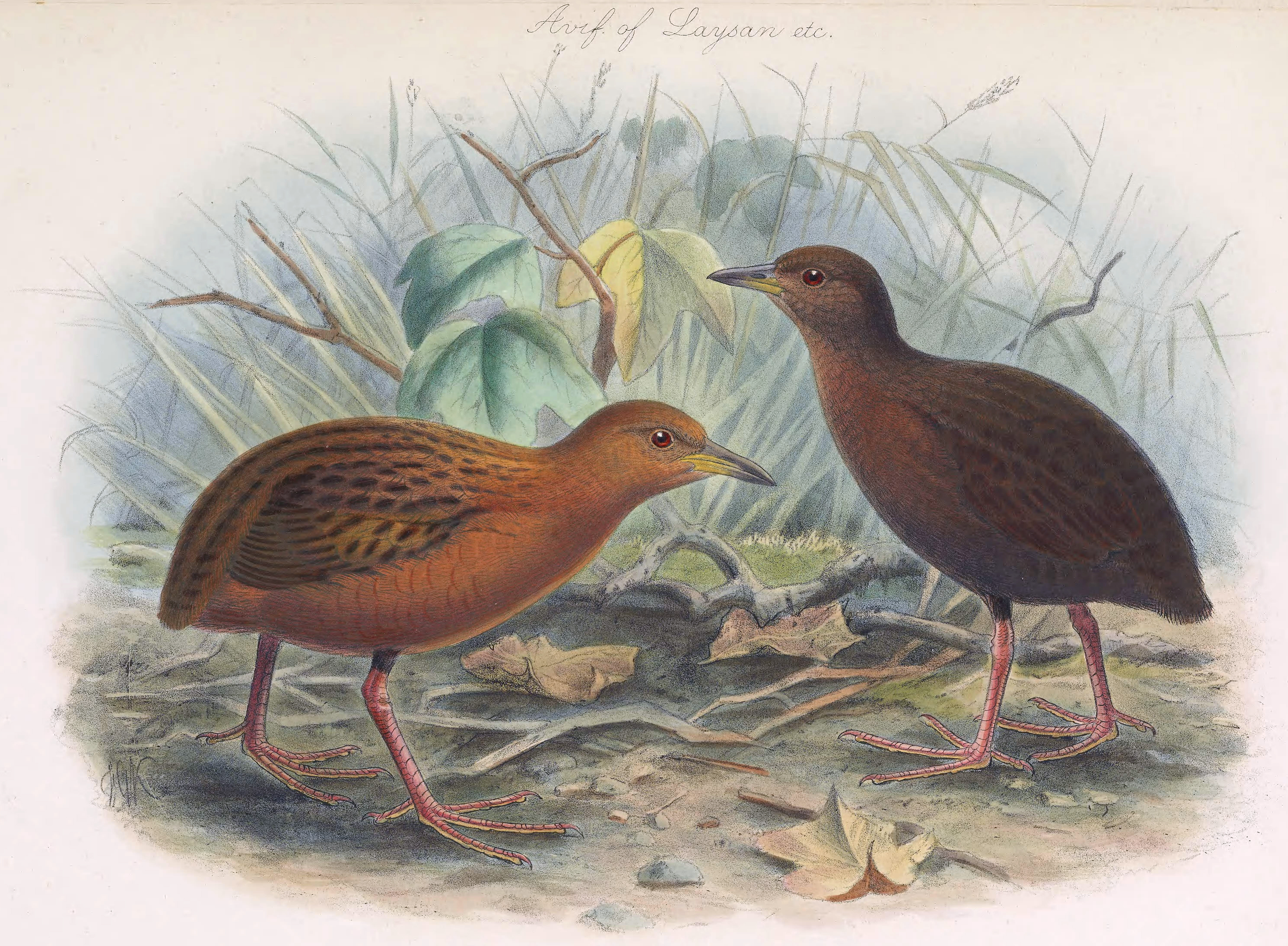 Hawaiiralle (Porzana sandwichensis). Es existierten eine helle (P. sandwichiensis) und eine dunkle Form (P. millsi).